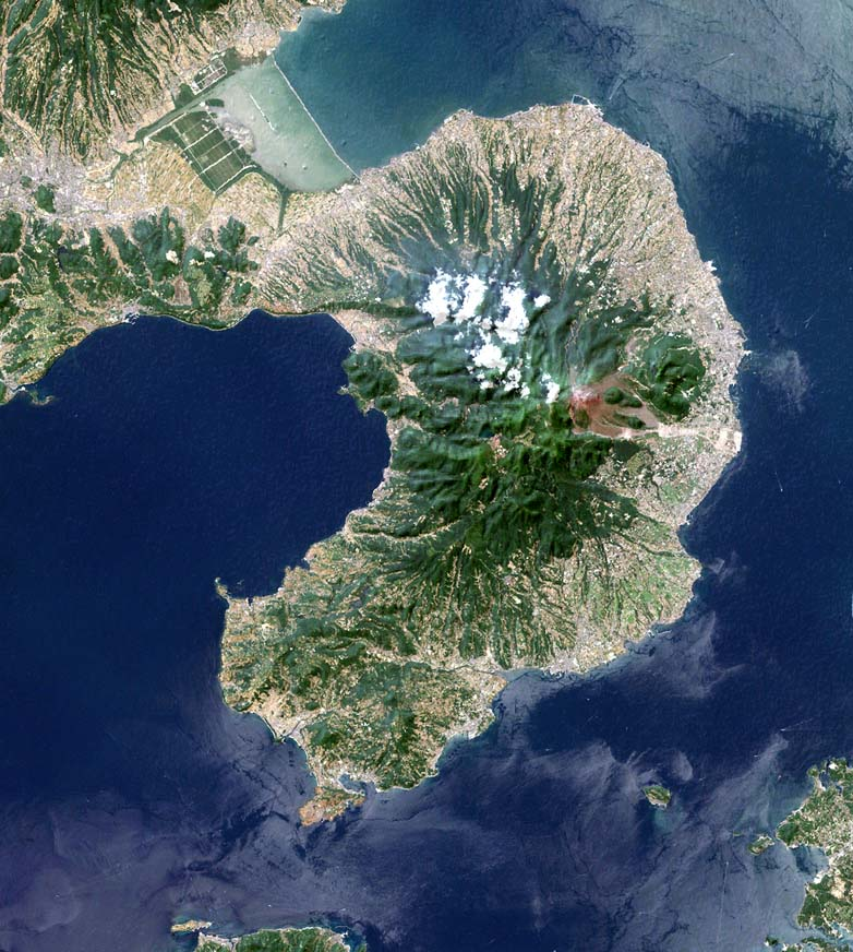 Shimabara Peninsula, Nagasaki, Japan.